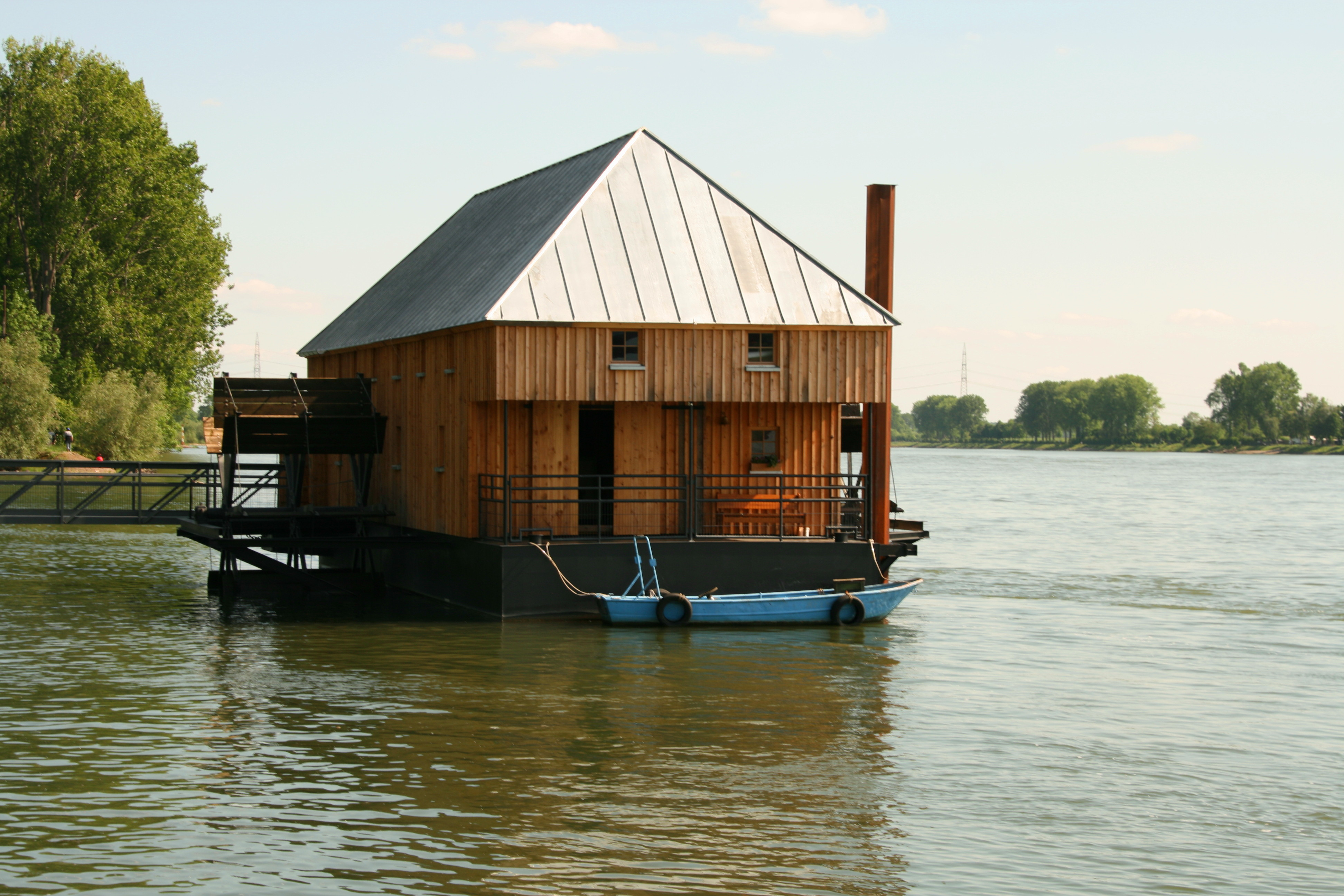 Rekonstruierte Schiffsmühle in Ginsheim-Gustavsburg auf dem Rhein.